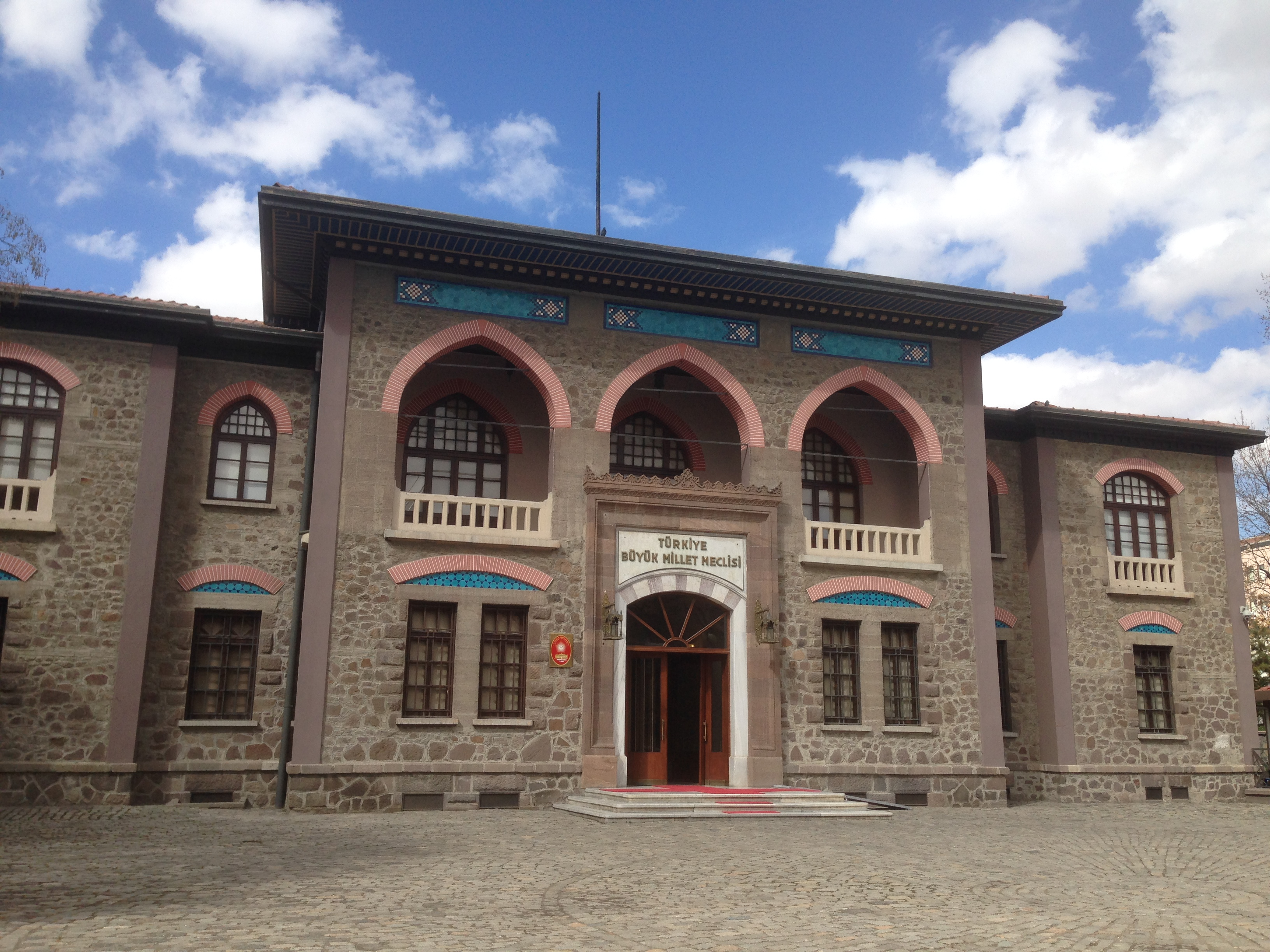 TBMM birinci meclis